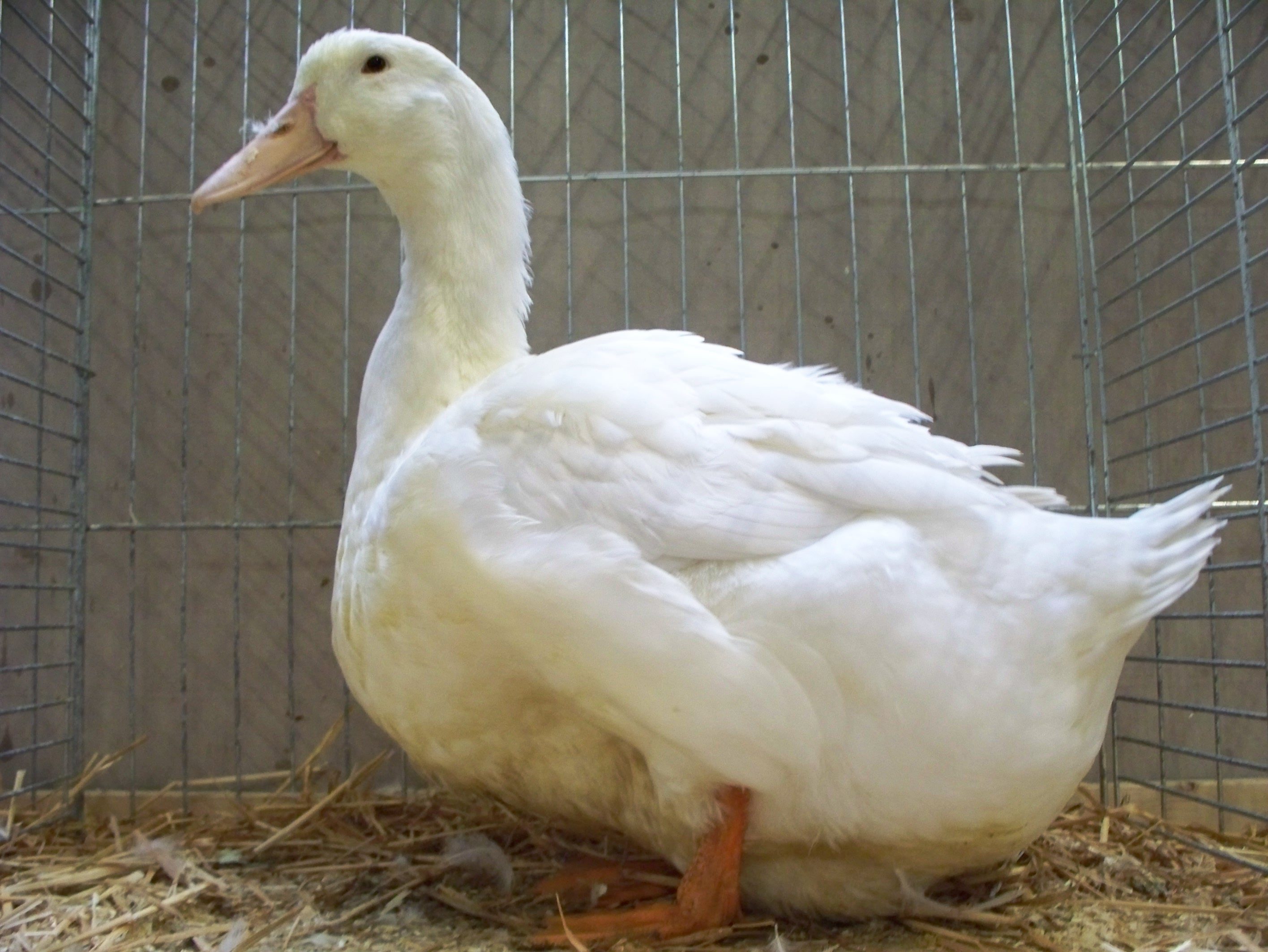 Aylesburyente